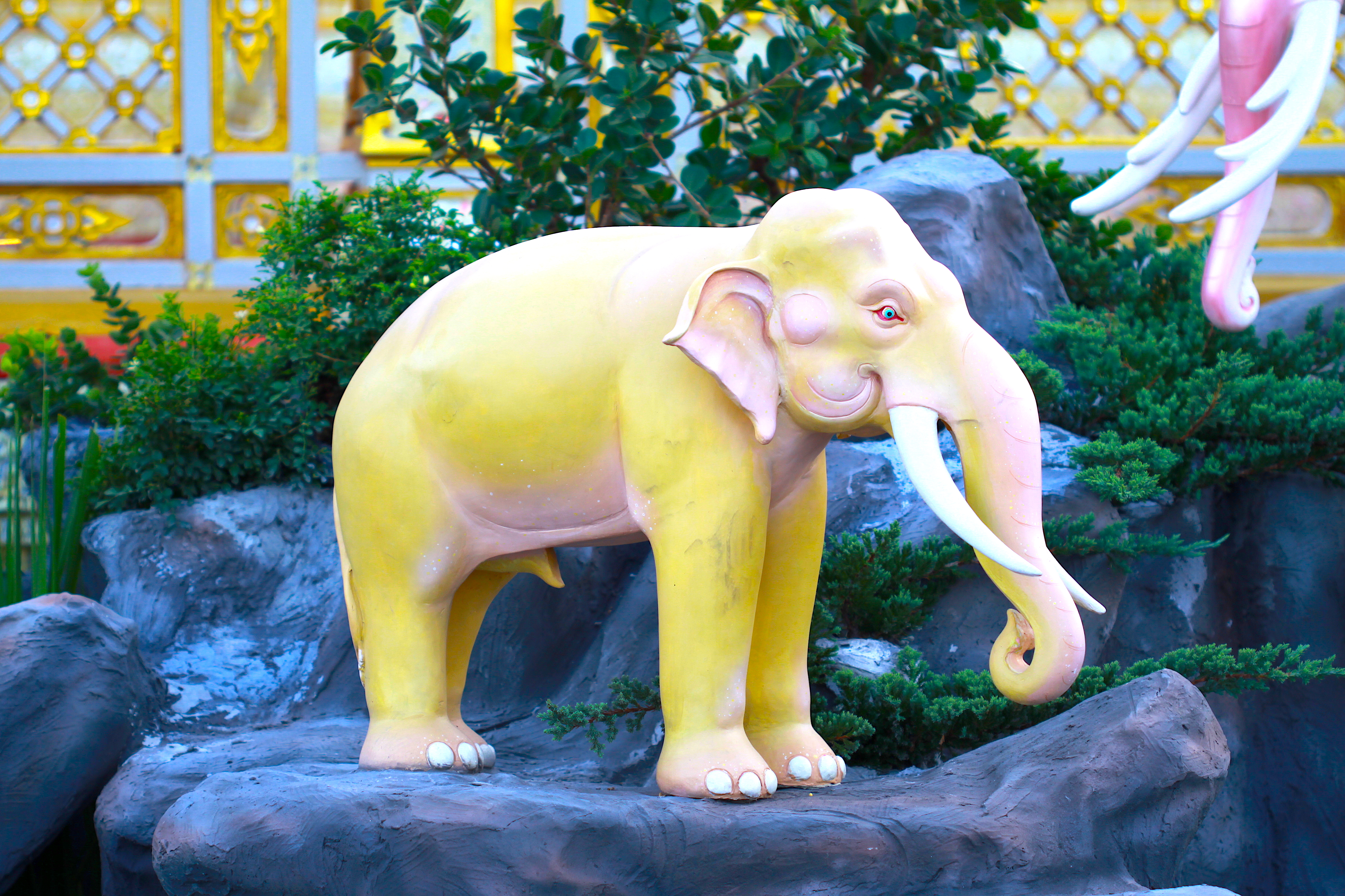 ประติมากรรมสัตว์หิมพานต์ ประดับตกแต่งรอบสระอโนดาต พระเมรุมาศในพระราชพิธีถวายพระเพลิงพระบรมศพ พระบาทสมเด็จพระปรมินทรมหาภูมิพลอดุลยเดช